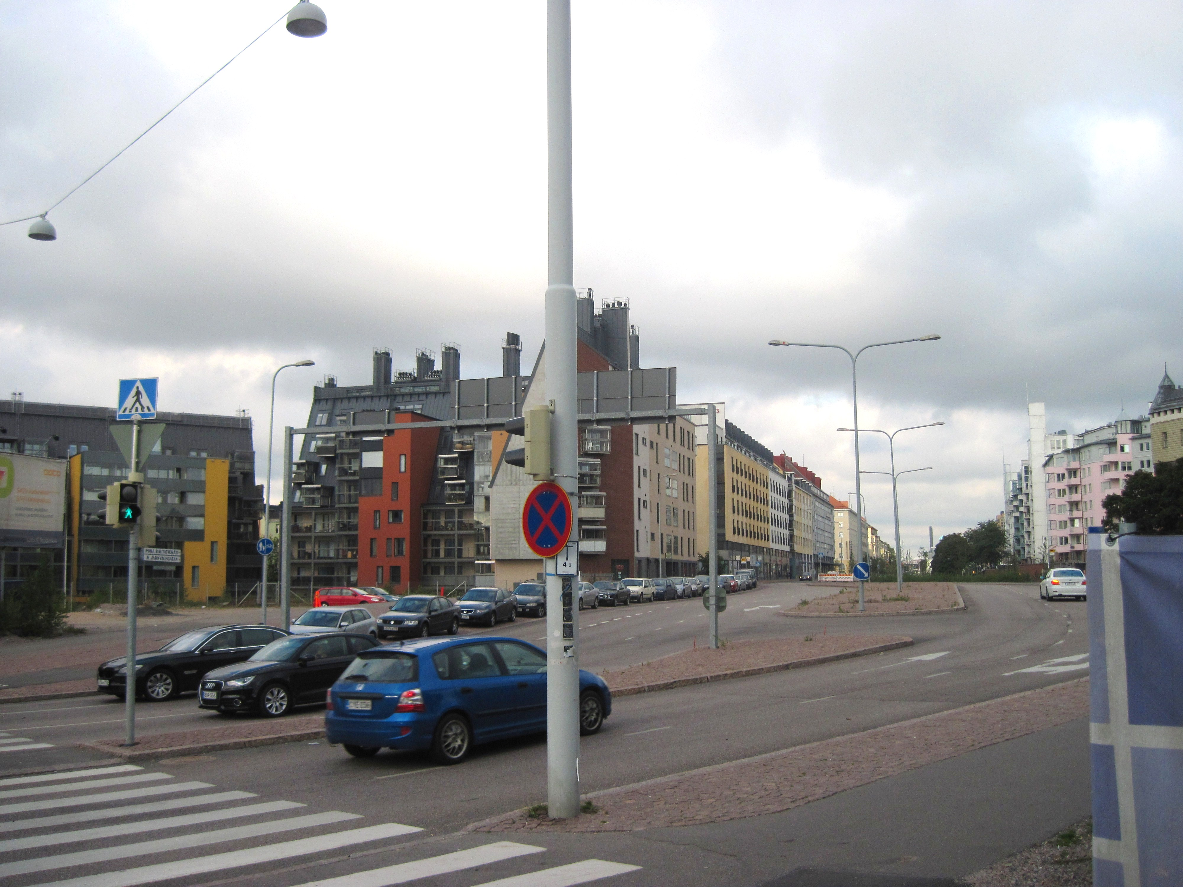 Leppasuo, Helsinki, seen from West